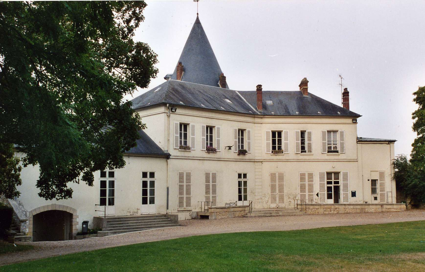 Trie-Château (Oise) Mairie, côté jardin.